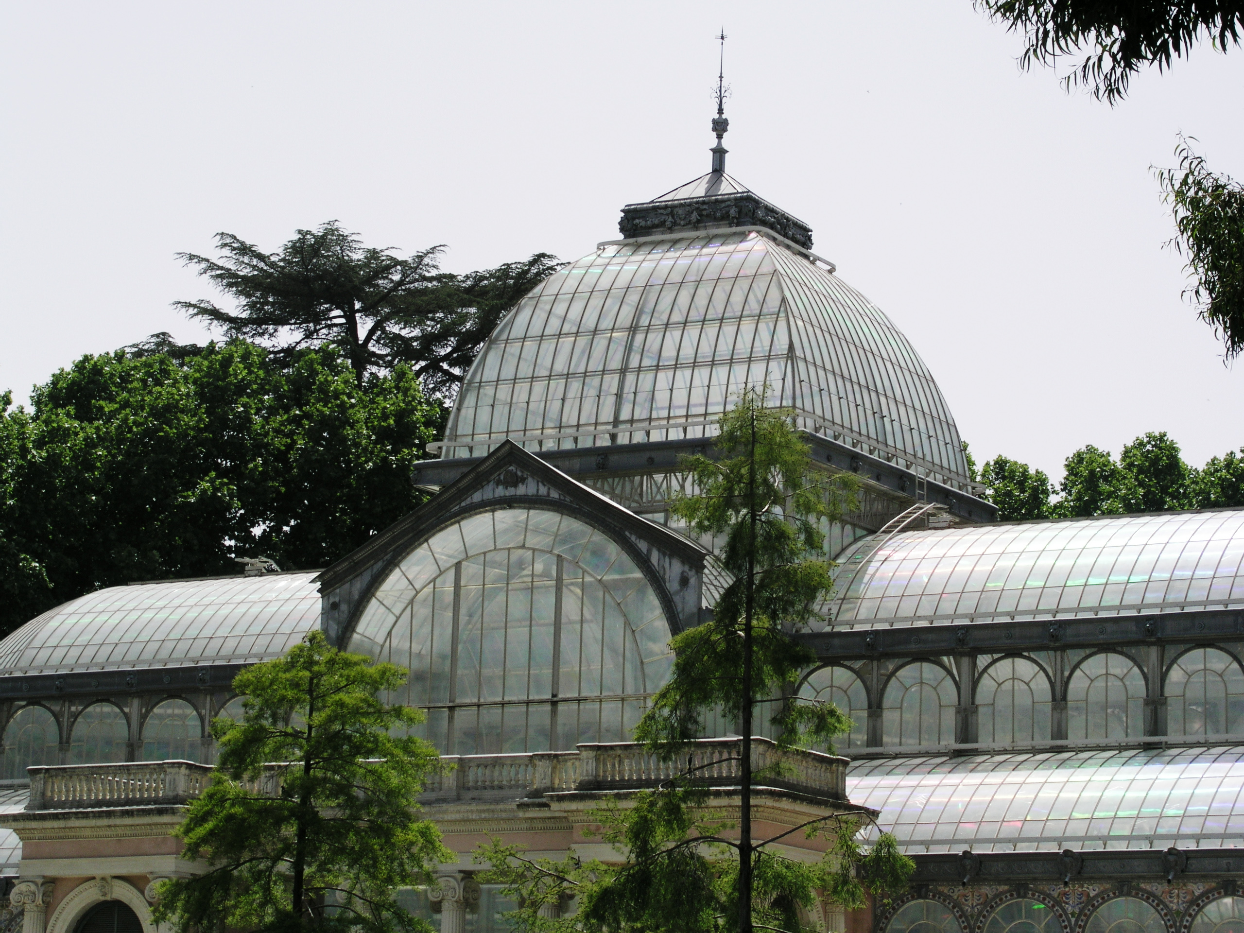 Palacio de Cristal, Parque del Buen Retiro, Madrid, Spain